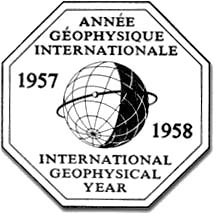 Logo vom Internationalen Geophysikalischen Jahr